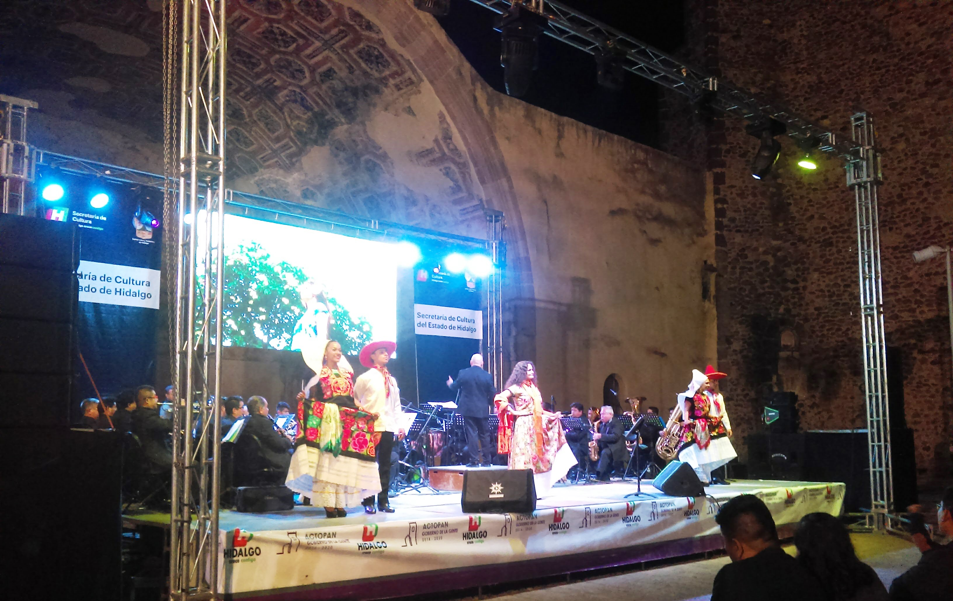 Banda Sinfónica del Estado de Hidalgo